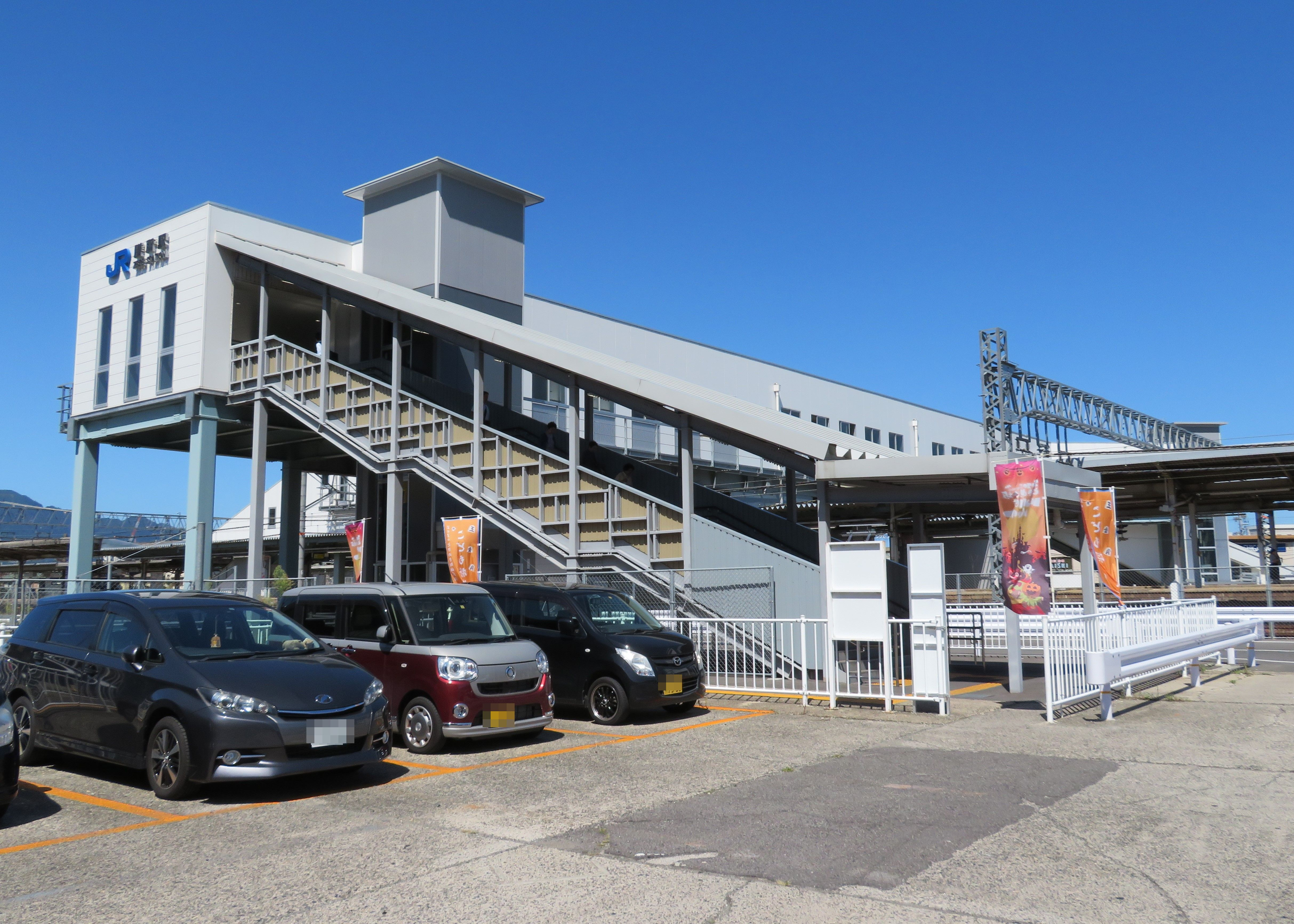 JR膳所駅南口